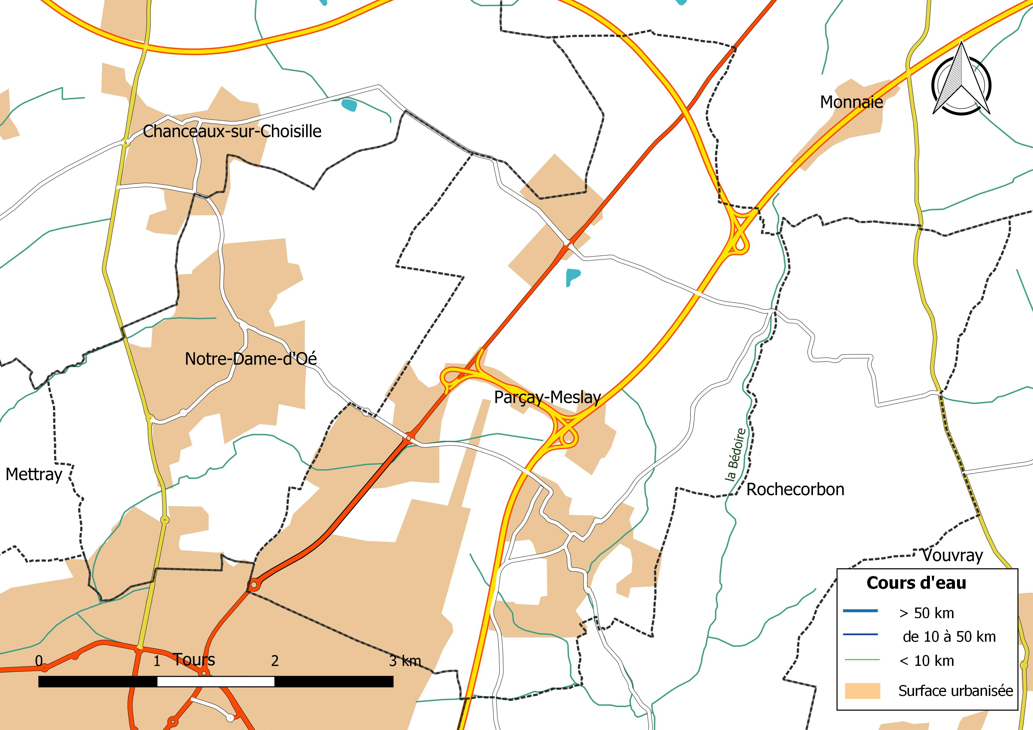 Carte du réseau hydrographique de la commune de Parçay-Meslay (France).